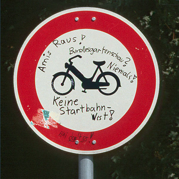 Die Gartenschaugegner verschafften sich auf höchst unterschiedliche Weise Gehör